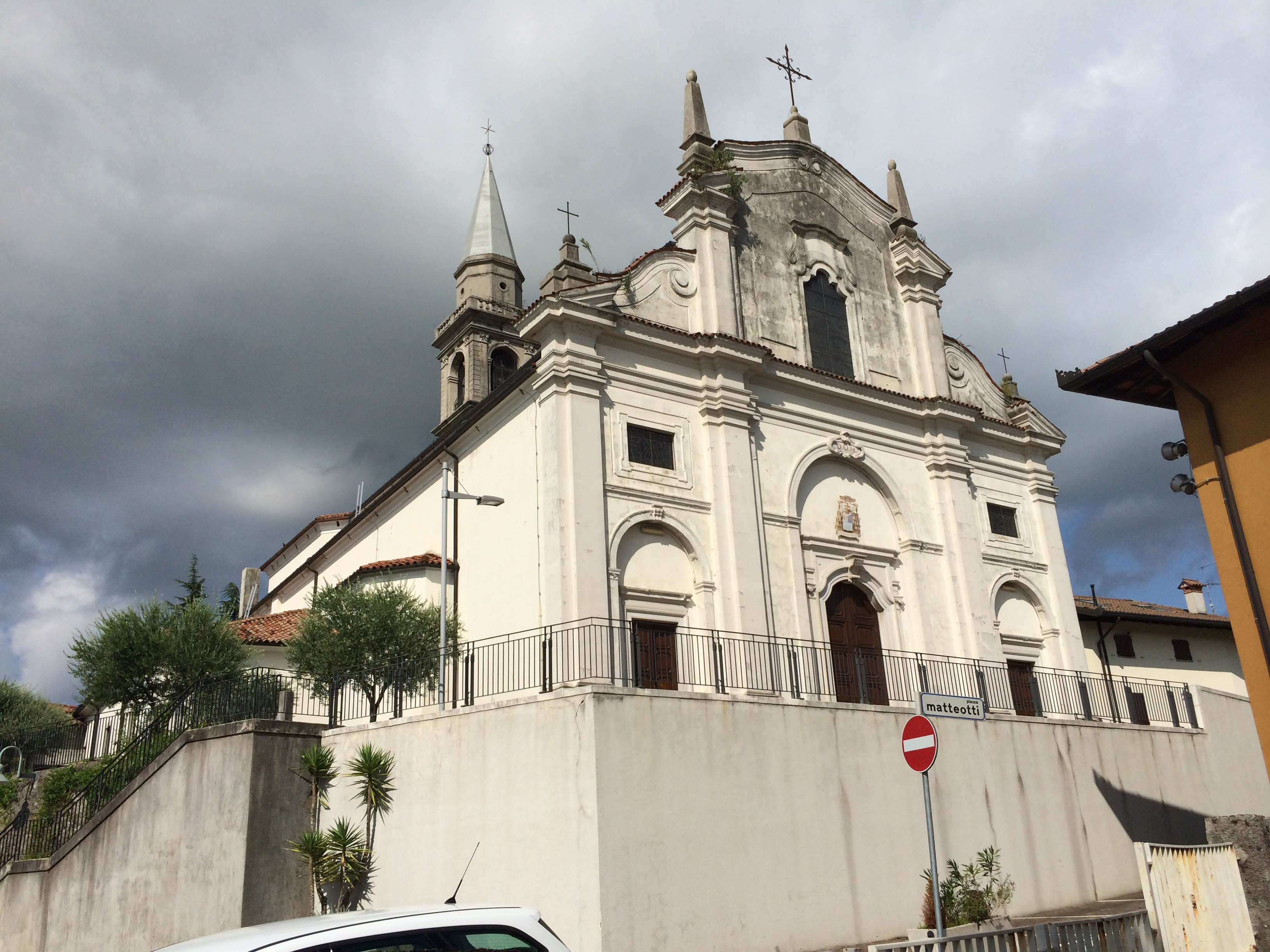 chiesa Pagnacco 02